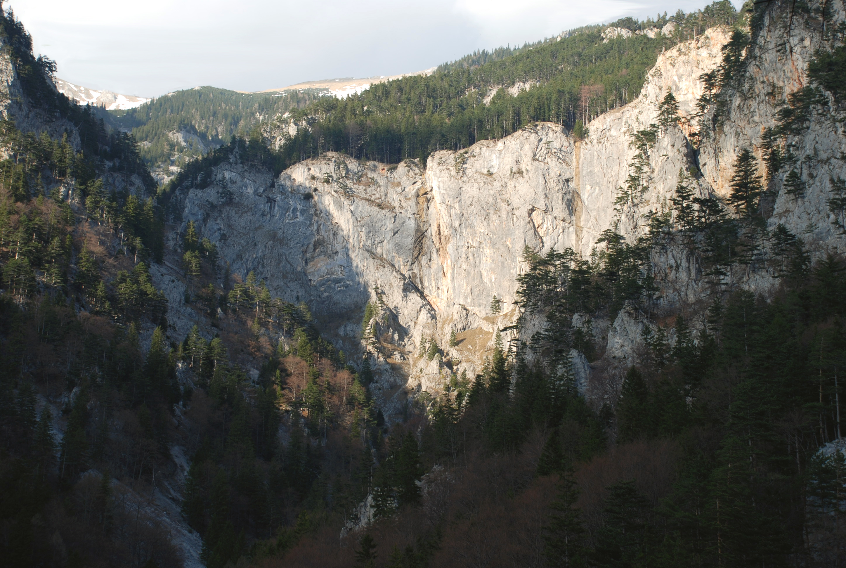 Felswände im Wasserofen (ein Felskar mit dem Namen „Ofen“) am Tal der Schwarza in Niederösterreich nördlich Kaiserbrunn zwischen Rax und Schneeberg (Höllental), aufgenommen vom Gegenhang (Standpunkt: Ansitzhütte der Jäger)